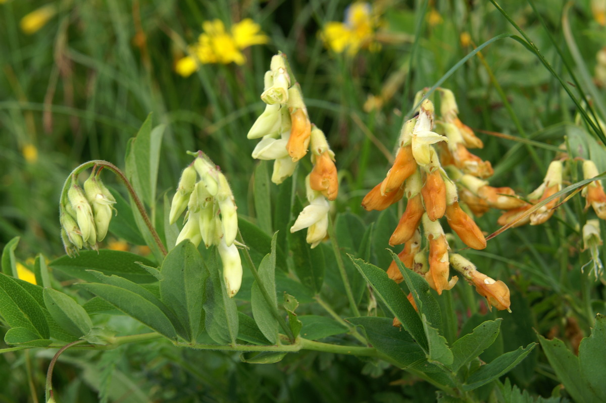 Goli grahor na Črni prsti.